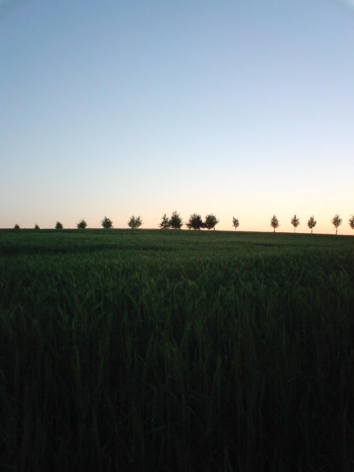 die Kuppe des Marderberges